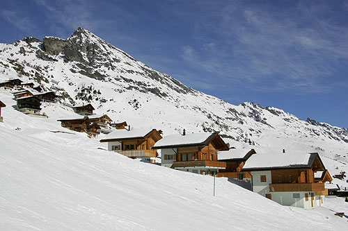 Lauchernalp